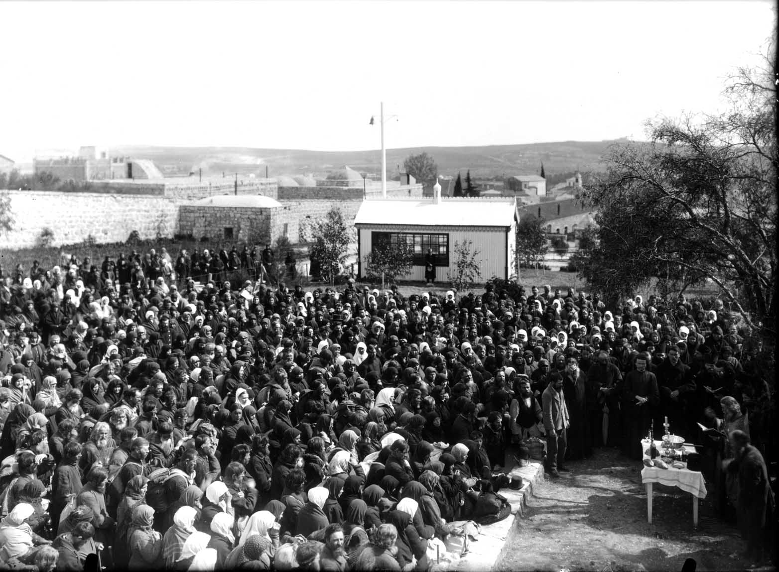 Русские православные паломники на Русском подворье в Иерусалиме. Фото монаха Тимона XIX в.